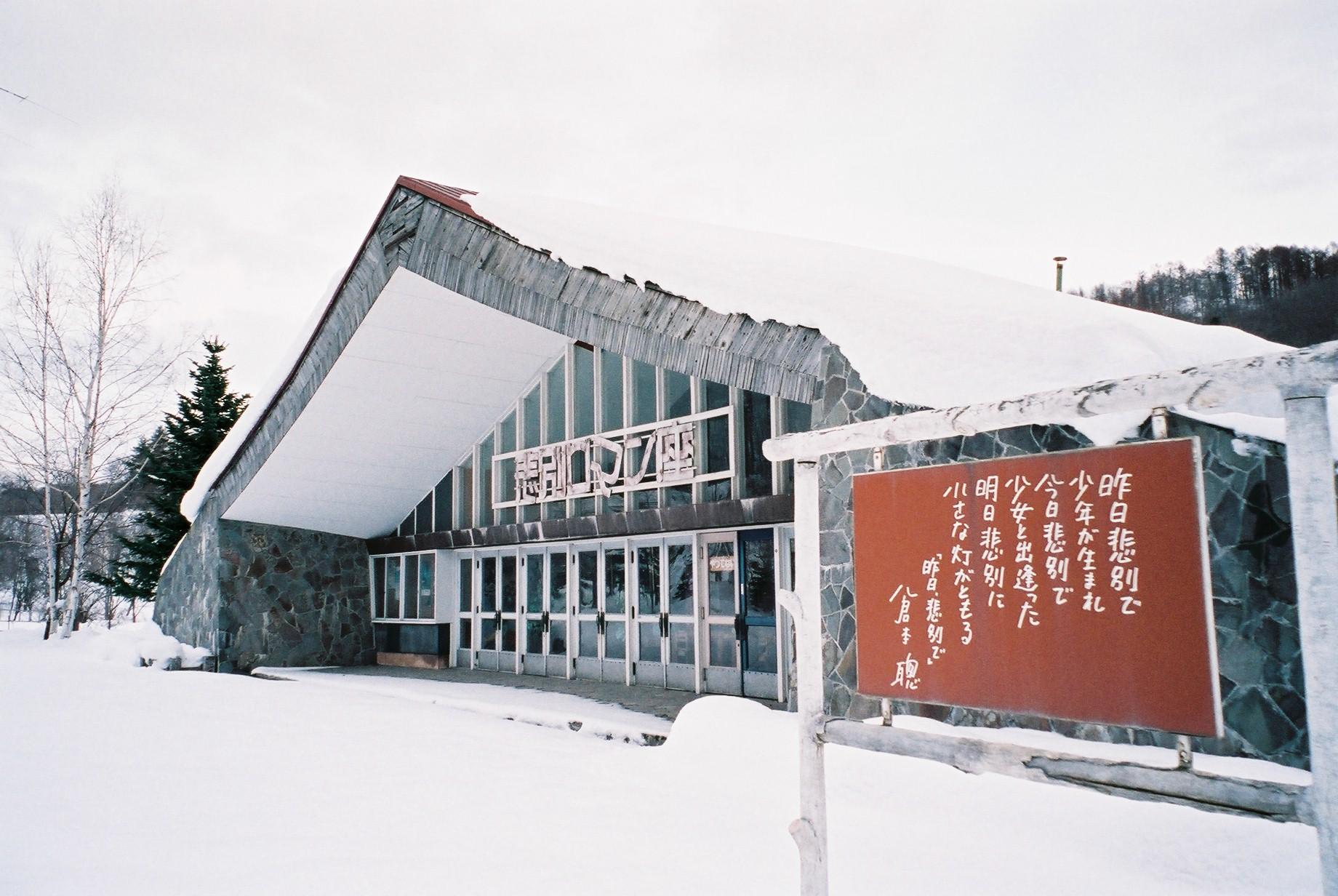 悲別ロマン座 2007年1月1日撮影.